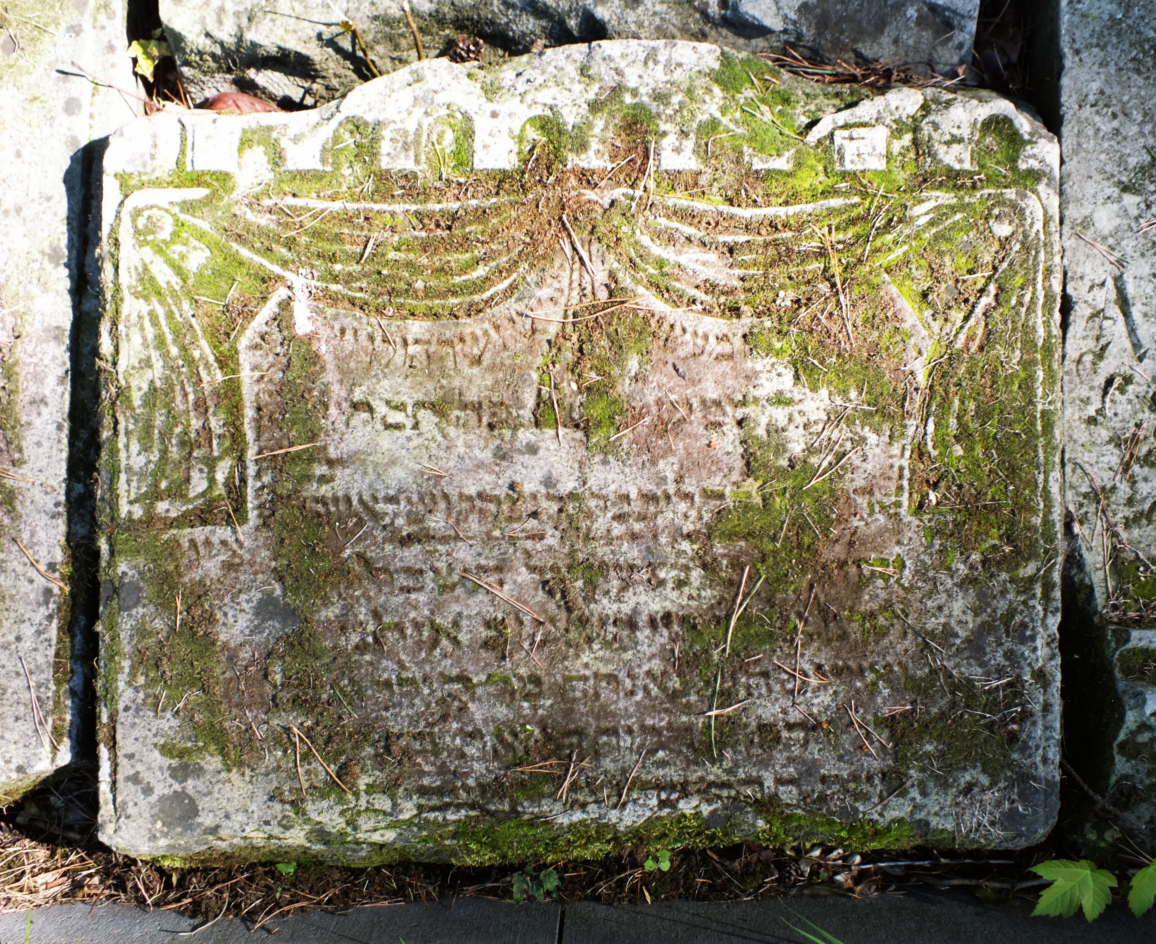 Czerniejewo, cmentarz żydowski